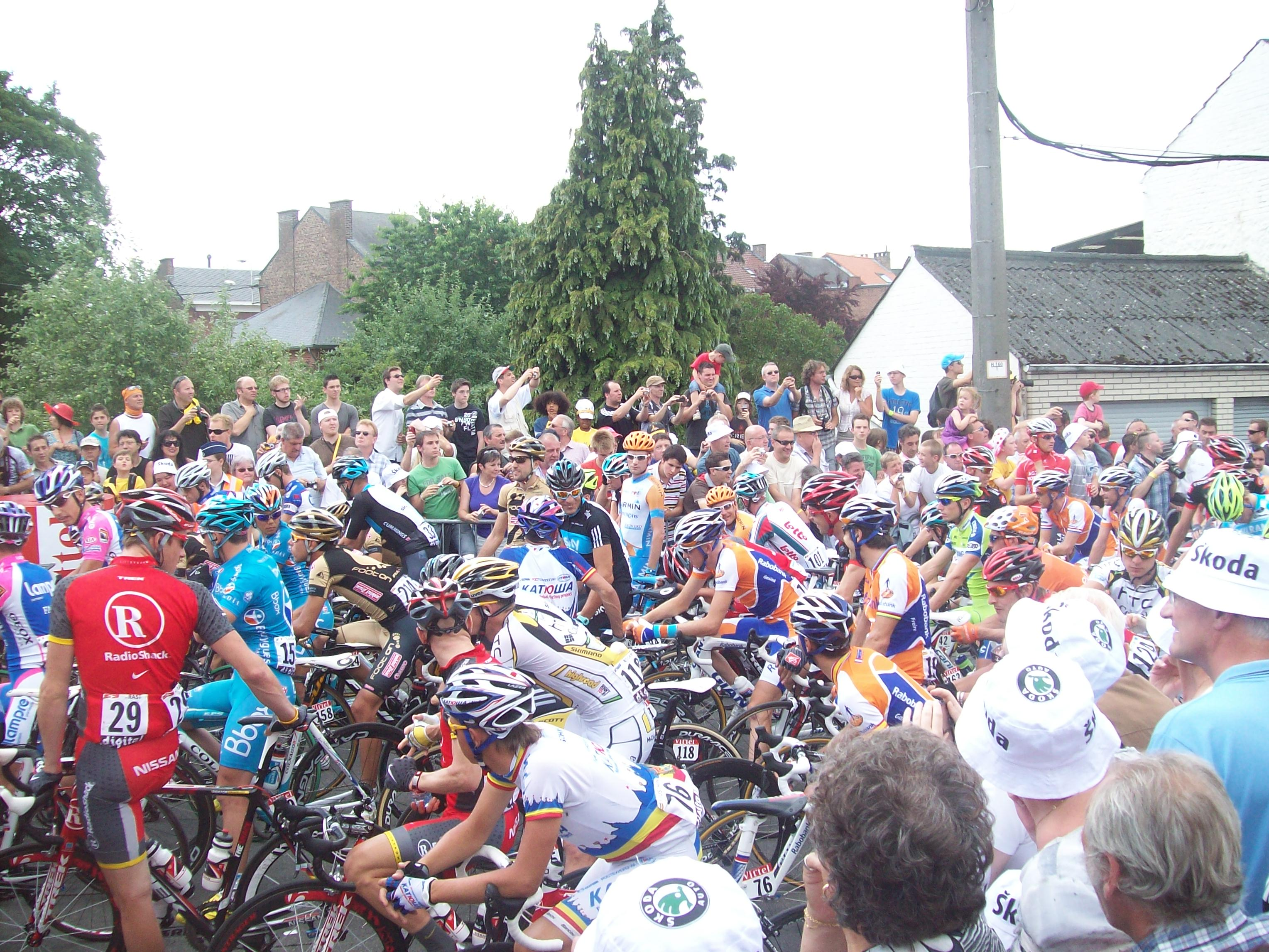 Peloton au départ de la 3e étape du Tour de France 2010 à Wanze, province de Liège, Belgique.